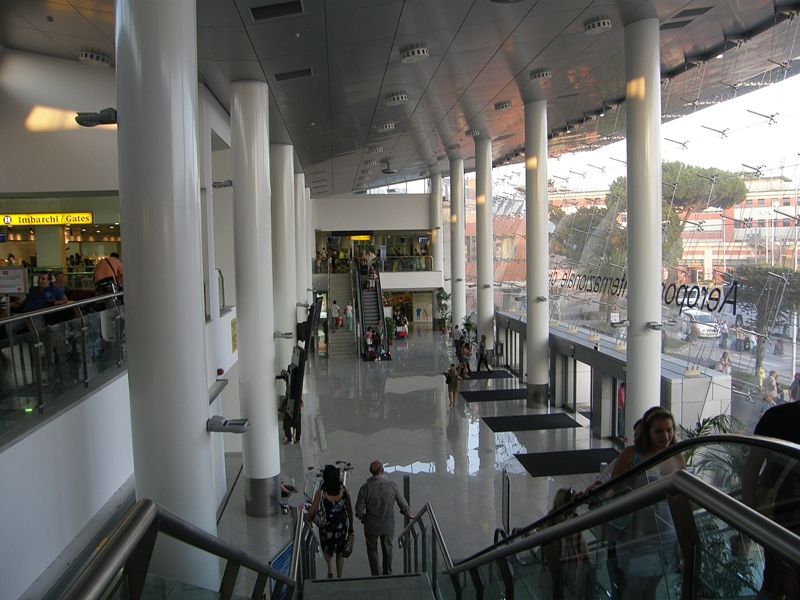 Naples